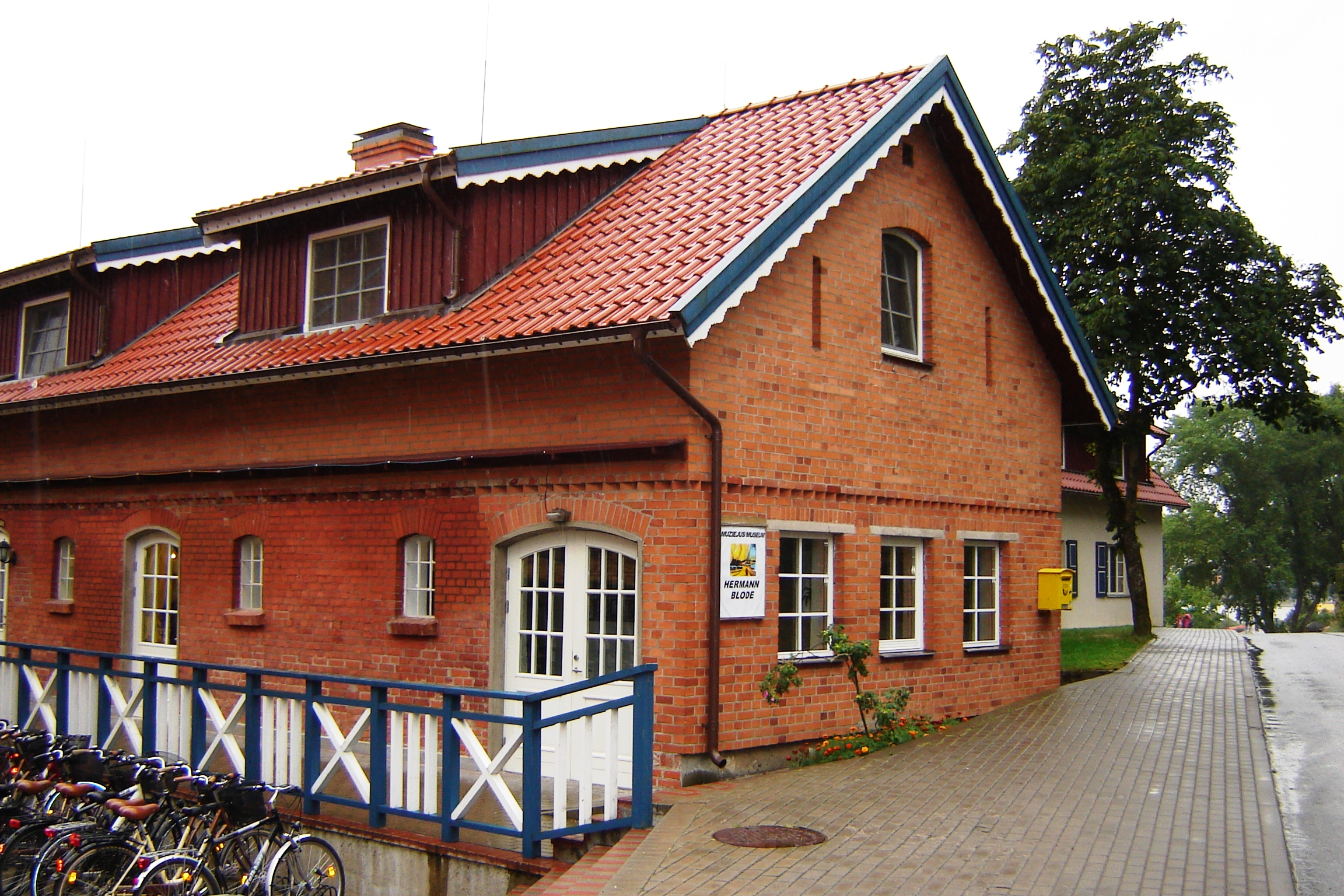 Hermann-Blode-Museum in Nida/Nidden